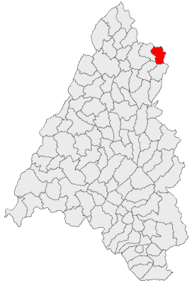 Categorie:Hărţi ale judeţului Bihor